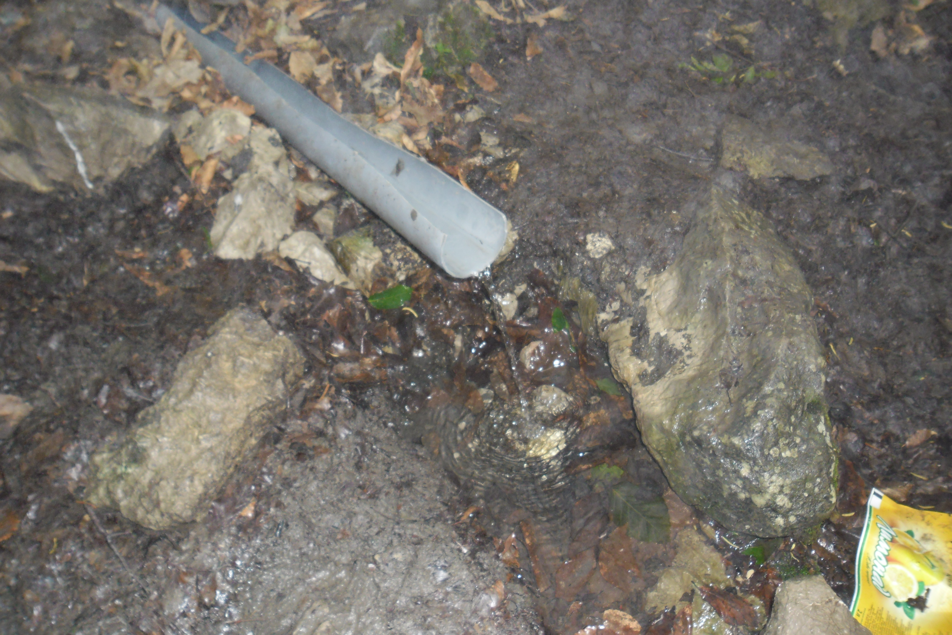 Фото